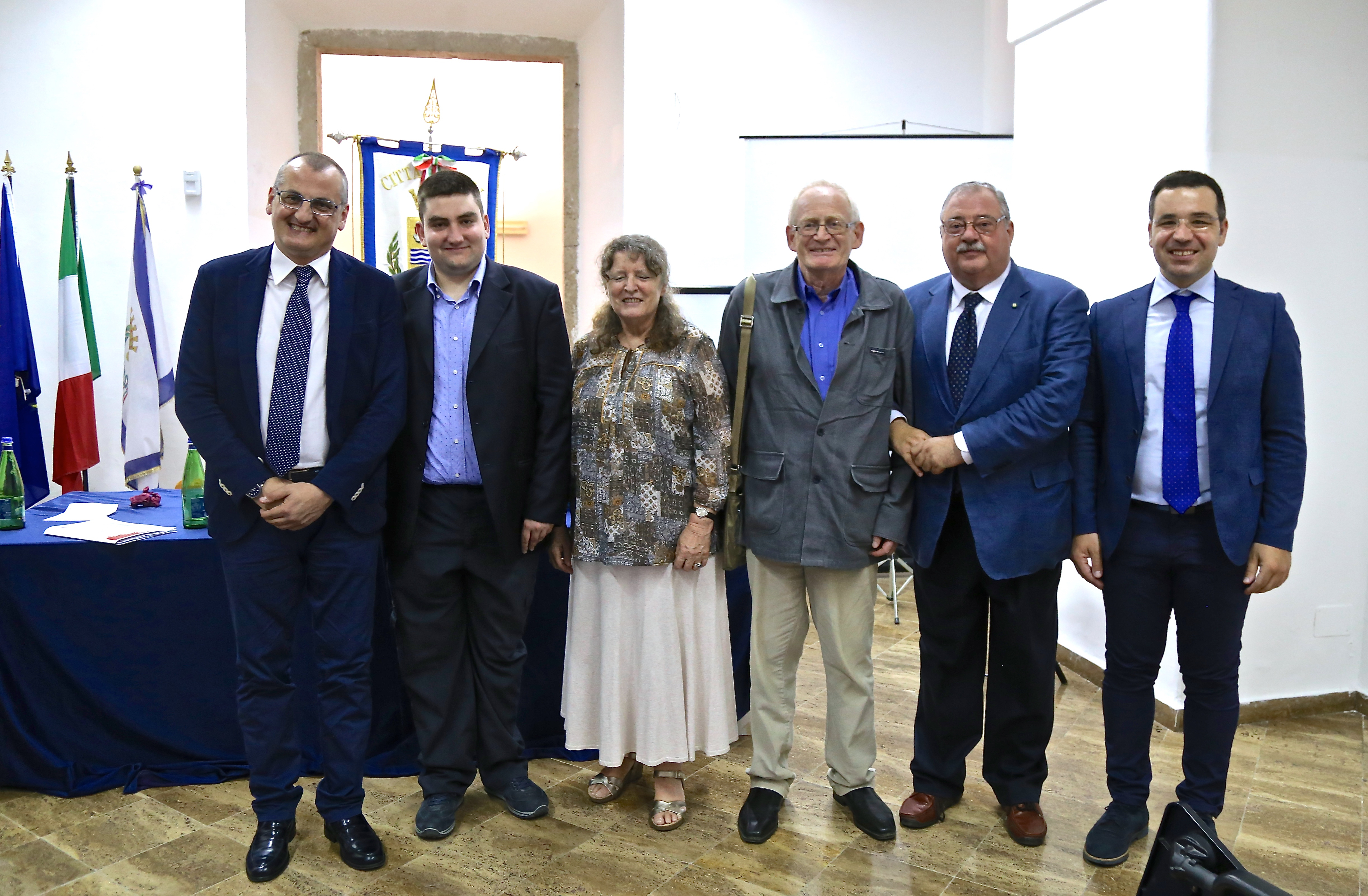 Alain Schnapp durante la cerimonia di conferimento della Cittadinanza Onoraria della Città di Eboli - Museo Archeologico Nazionale di Eboli - 22 Giugno 2017